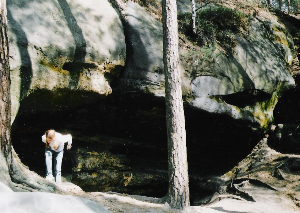 Pískovcová jeskyně Postojná typu abri, největší jeskyně Českého ráje